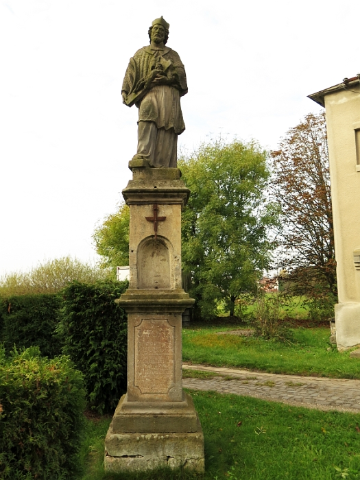 Socha svatého Jana Nepomuckého, Zámostí (Rožďalovice).